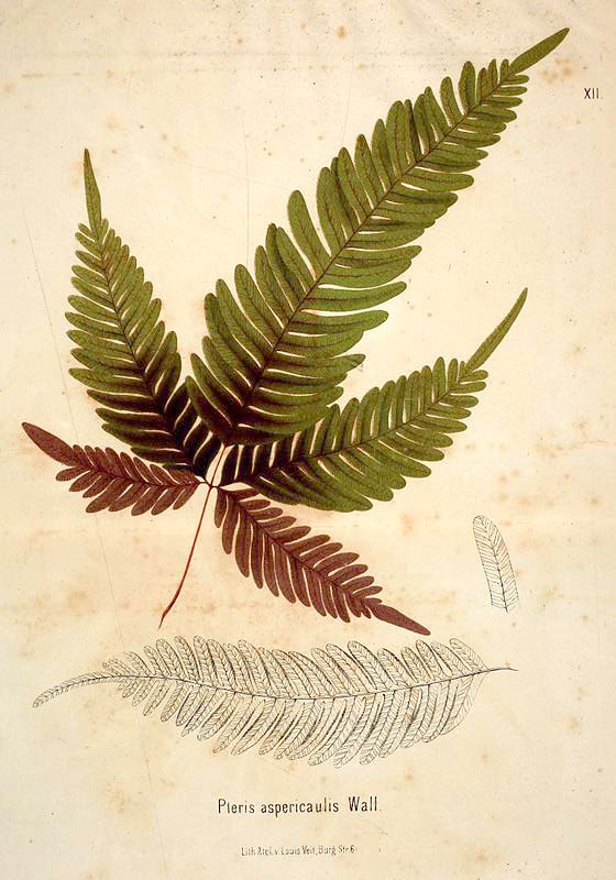 Pteris aspericaulis з книги Berliner allgemeine Gartenzeitung.